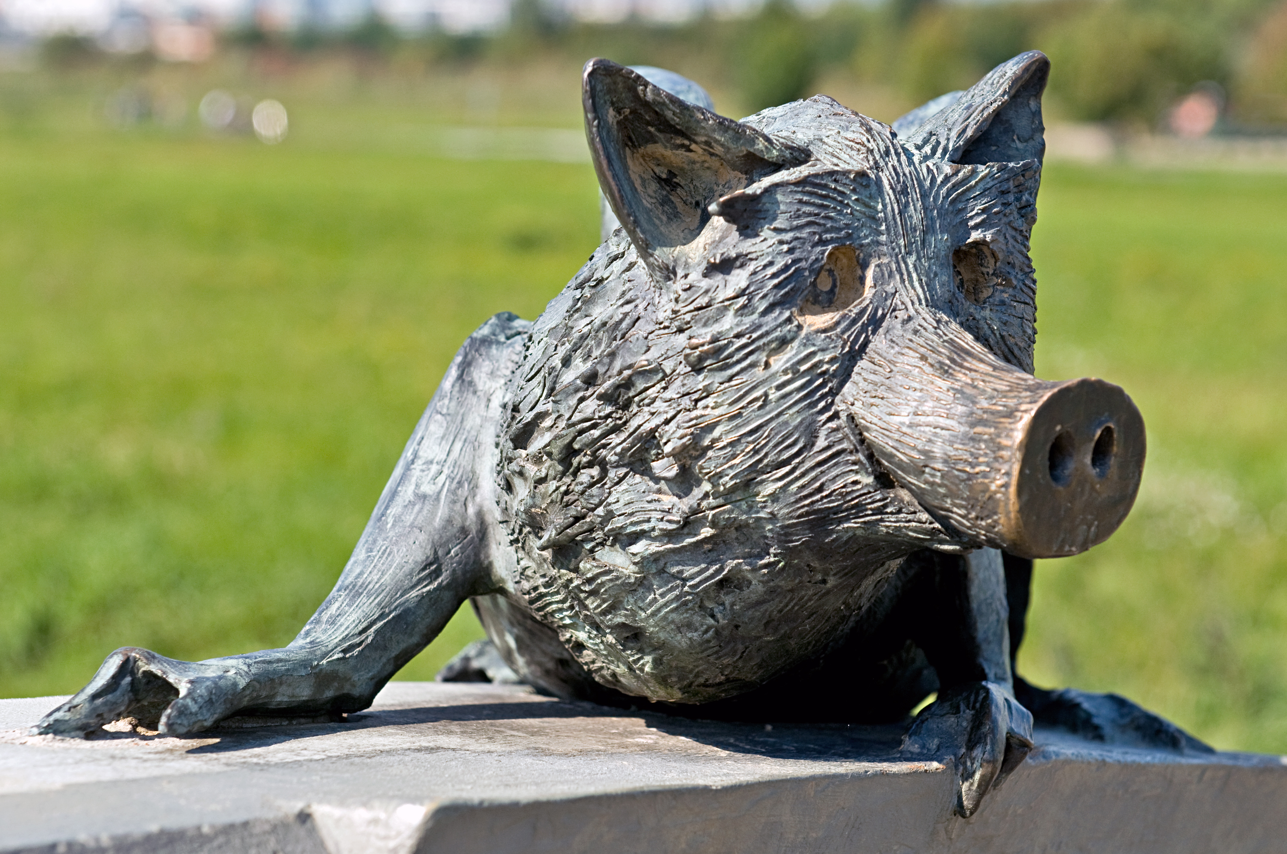 Frankfurter Grüngürteltier auf der Robert-Gernhardt-Brücke am Alten Flugplatz in Frankfurt-Bonames